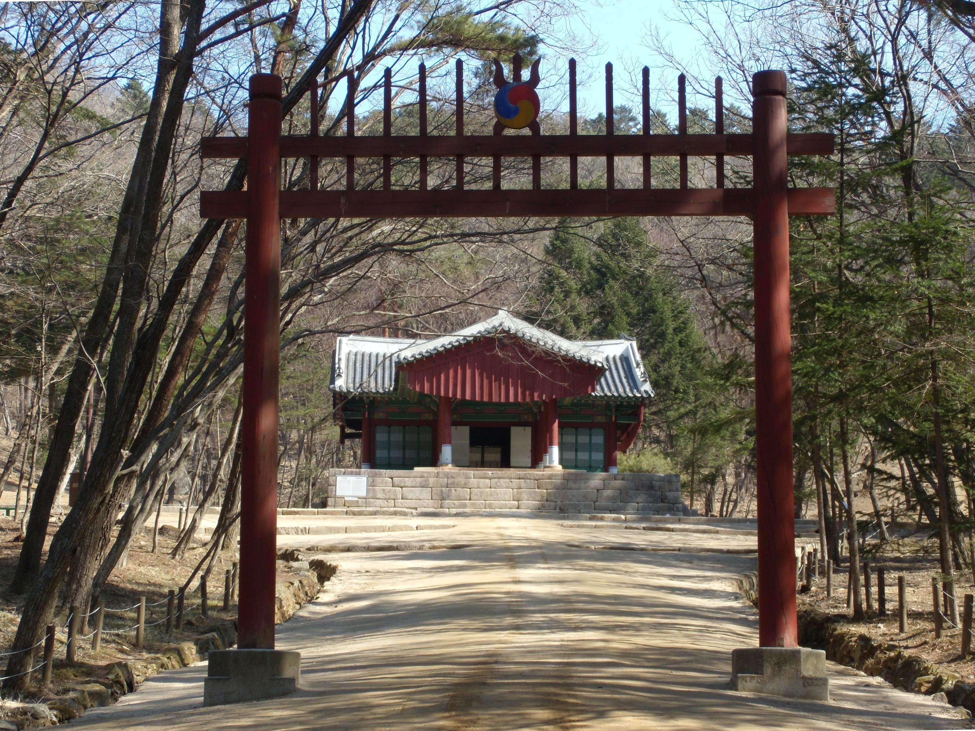 광릉 전경